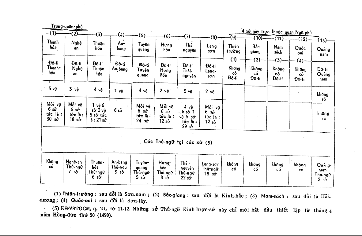 Tổ chức quân sự Ngũ phủ thời Lê Thánh Tông - lấy từ sách Tổ chức chính quyền trung ương dưới triều Lê Thánh Tông. Tác giả Lê Kim Ngân, do Bộ Giáo Dục Quốc Gia xuất bản năm 1963 trang 118